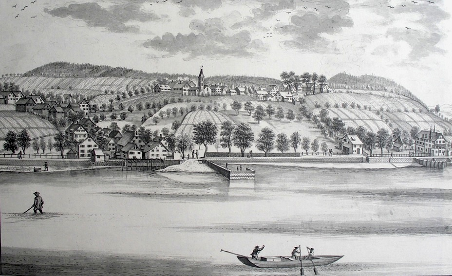 Zollikon um 1771: «Prospect von Statt und Zürich See 1771/72» Kupferstich von Johann Jakob Hofmann (1730-1772); 1791 bis 1794 herausgegeben vom Verleger Johannes Hofmeister. Rechts das Gut «Trubenberg»